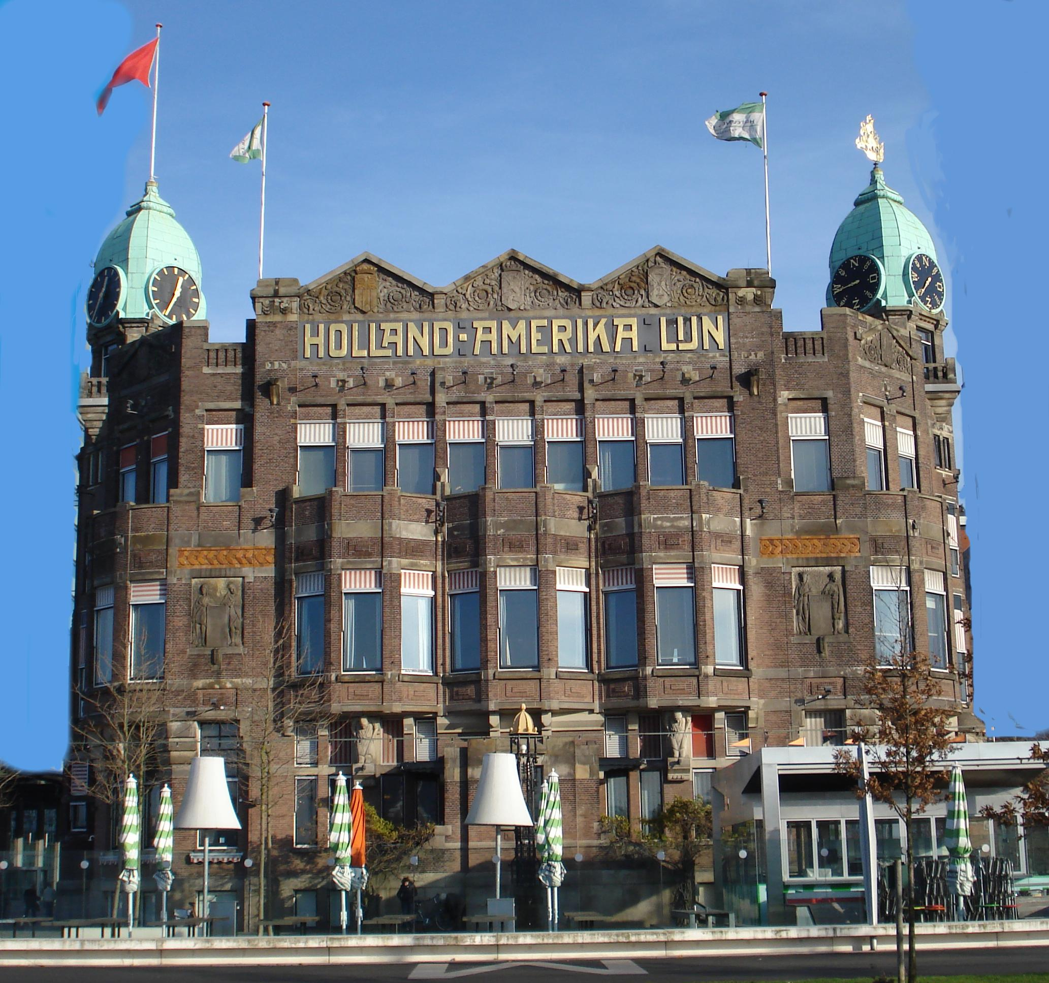 Rotterdam, Hotel New York. Rijksmonument. Foto is opgeschoond voor omringende woontorens.